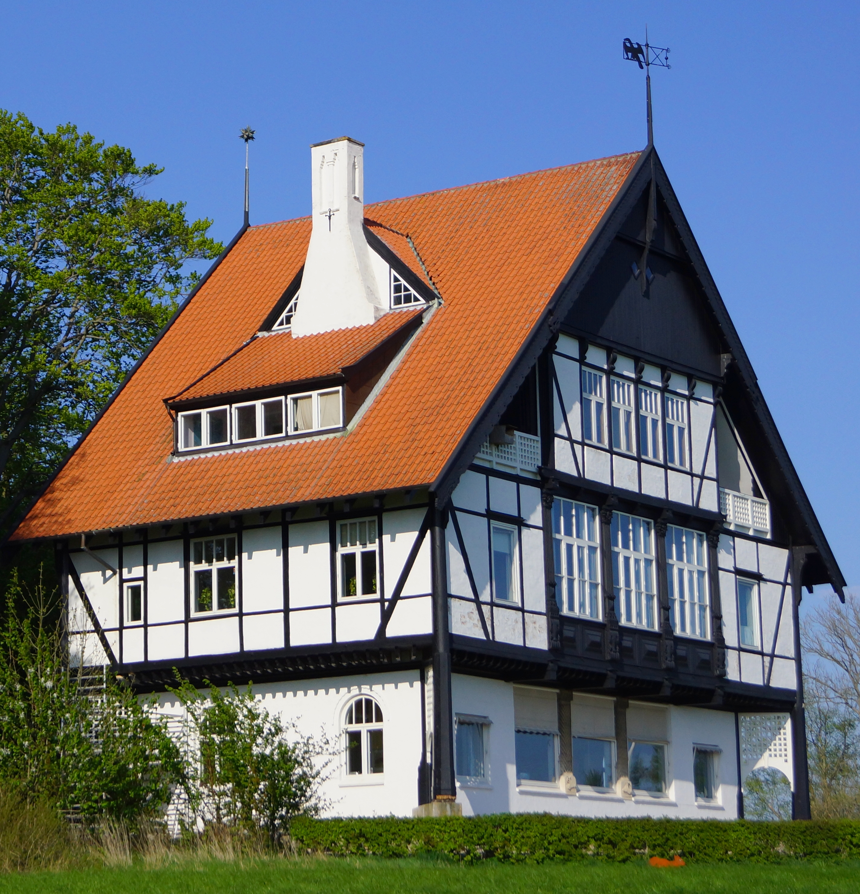 Kalø, Jagtslottet